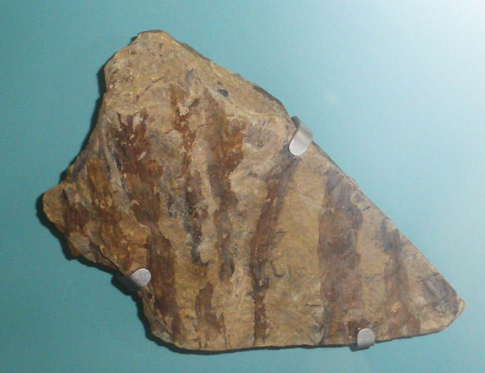 Fossil of Drepanophycus, an extinct plant- Took the photo at Senckenberg Museum of Frankfurt